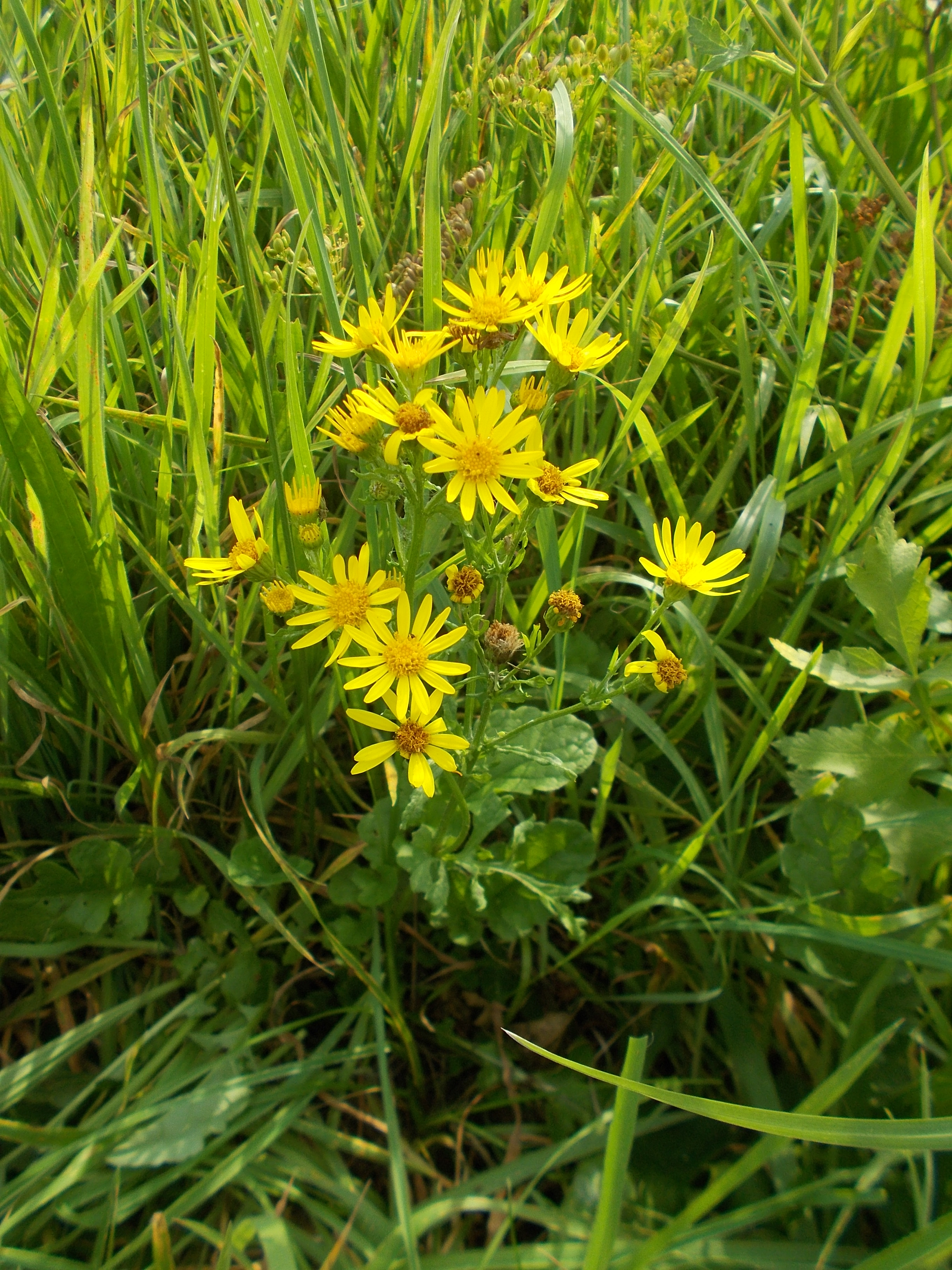 Waterkruiskruid